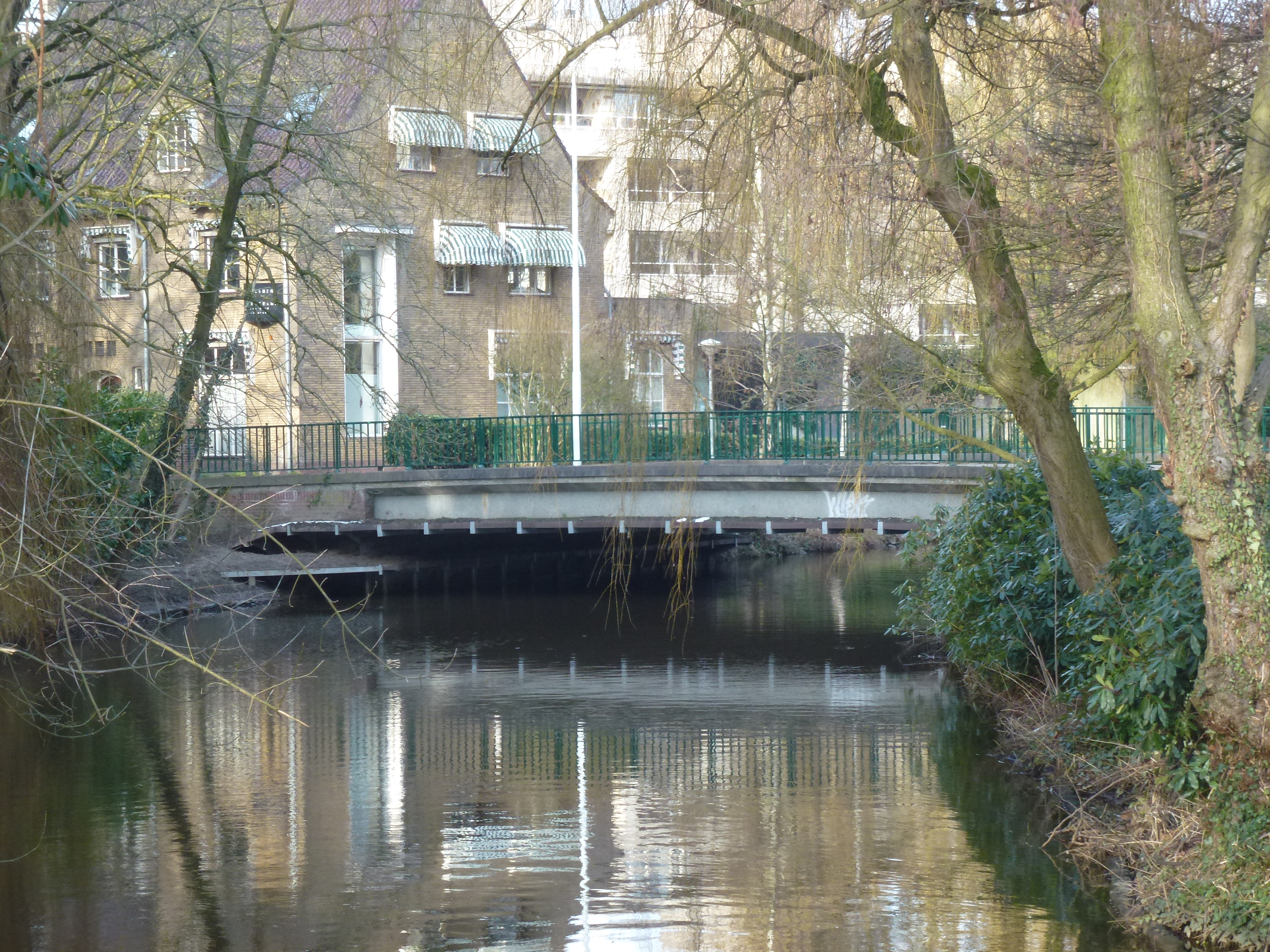 Brug over de Dommel Paradijslaan Eindhoven zuidzijde